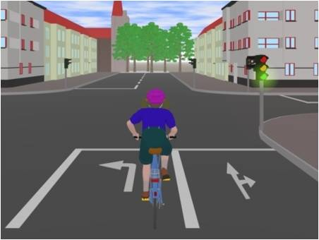 Bildschirm aus dem Verkehrsquiz